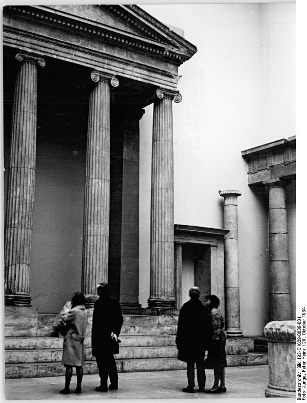 Berlin, Vorderasiatisches Museum Zentralbild Junge 29.10.64 Schätze antiker Kunst… werden alljährlich von vielen Besuchern aus dem In- und Ausland im Vorderasiatischen Museum der Staatlichen Museen zu Berlin, der Hauptstadt der DDR, bewundert. Unser Bild zeigt Besucher vor dem Aufbau der Westseite (zugleich Hauptfront) des Zeus-Sosipolis-Tempels, der Anfang des 2. Jahrtausends vor unserer Zeitrechnung am Marktplatz der Stadt Magnesia am Mäander gebaut wurde (links) .